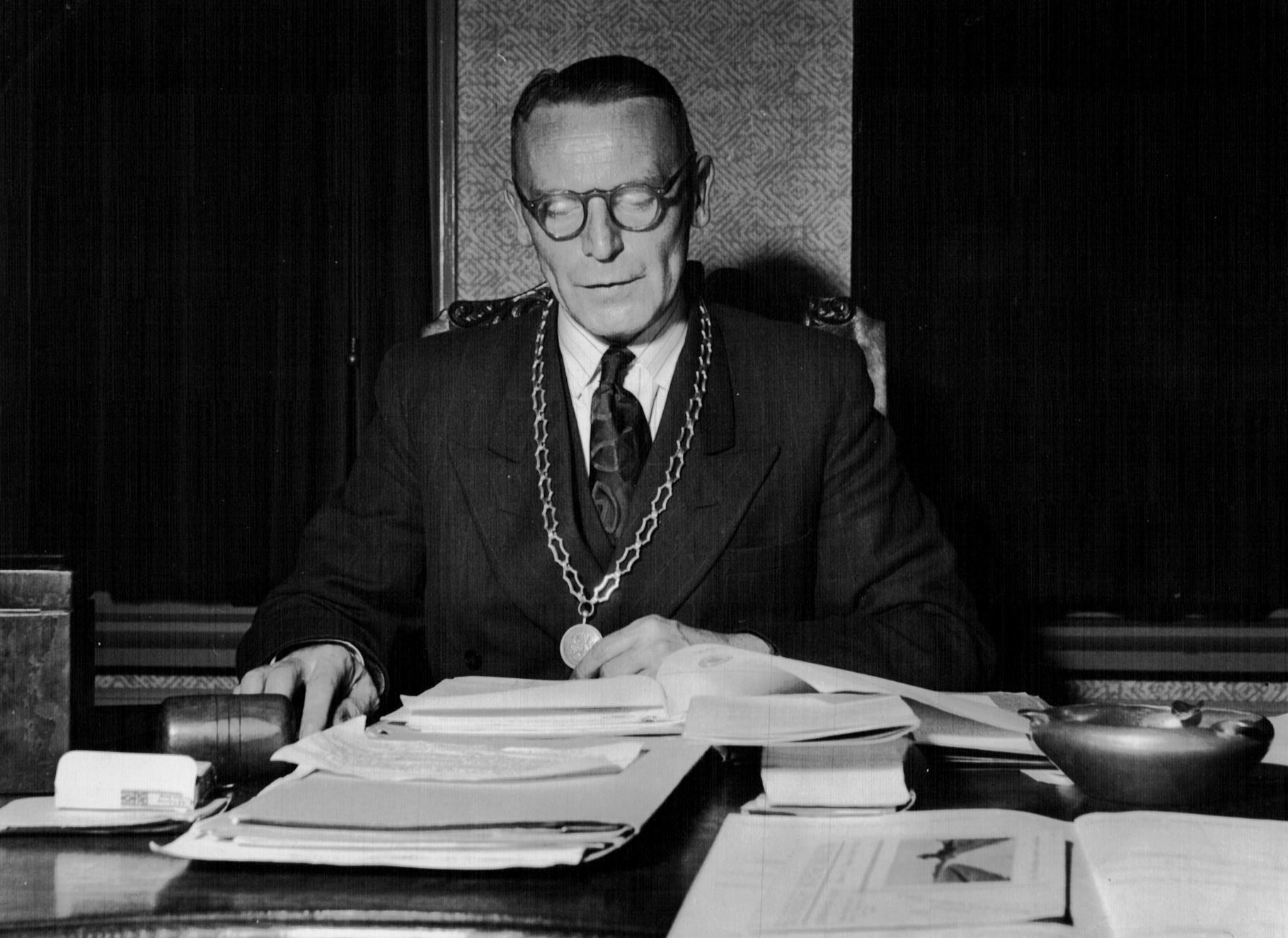 deze foto is genomen in de periode 1950 en 1952